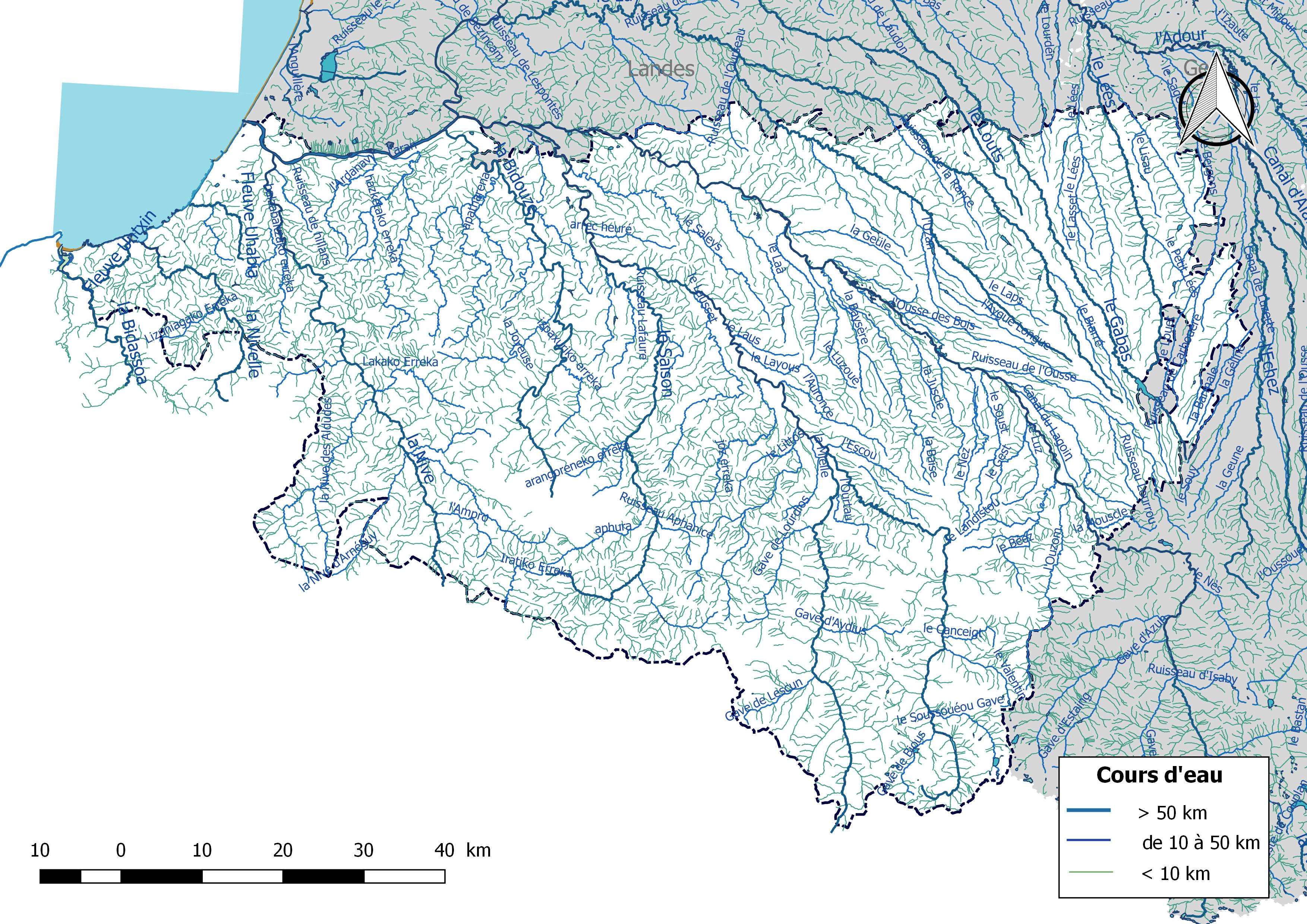 Réseau hydrographique du département des Pyrénées-Atlantiques (France).